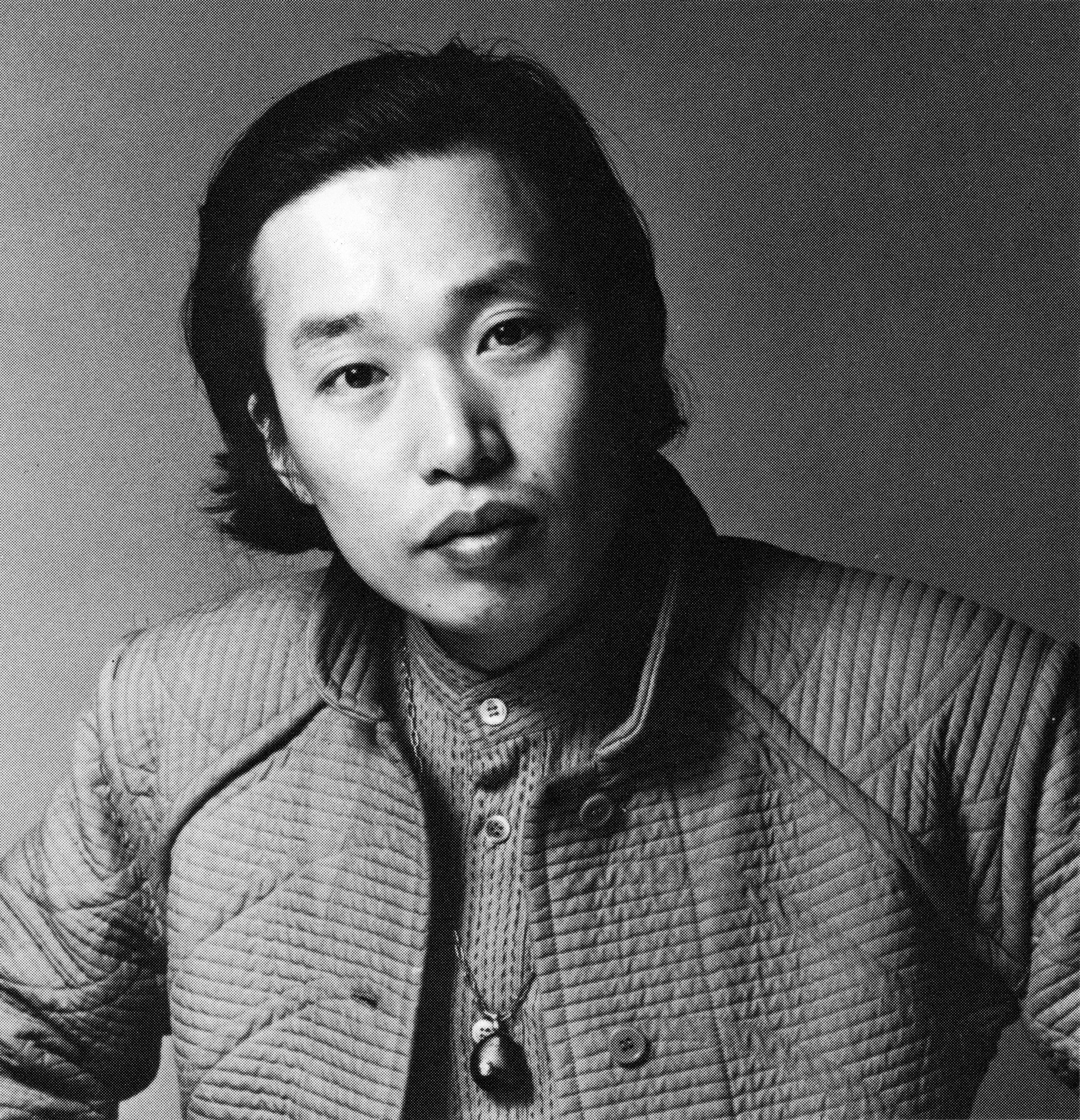 田中治彦作品N.Y.展パンフレット使用顔写真。